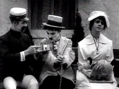 Кадр из фильма «Лечение» (1917)